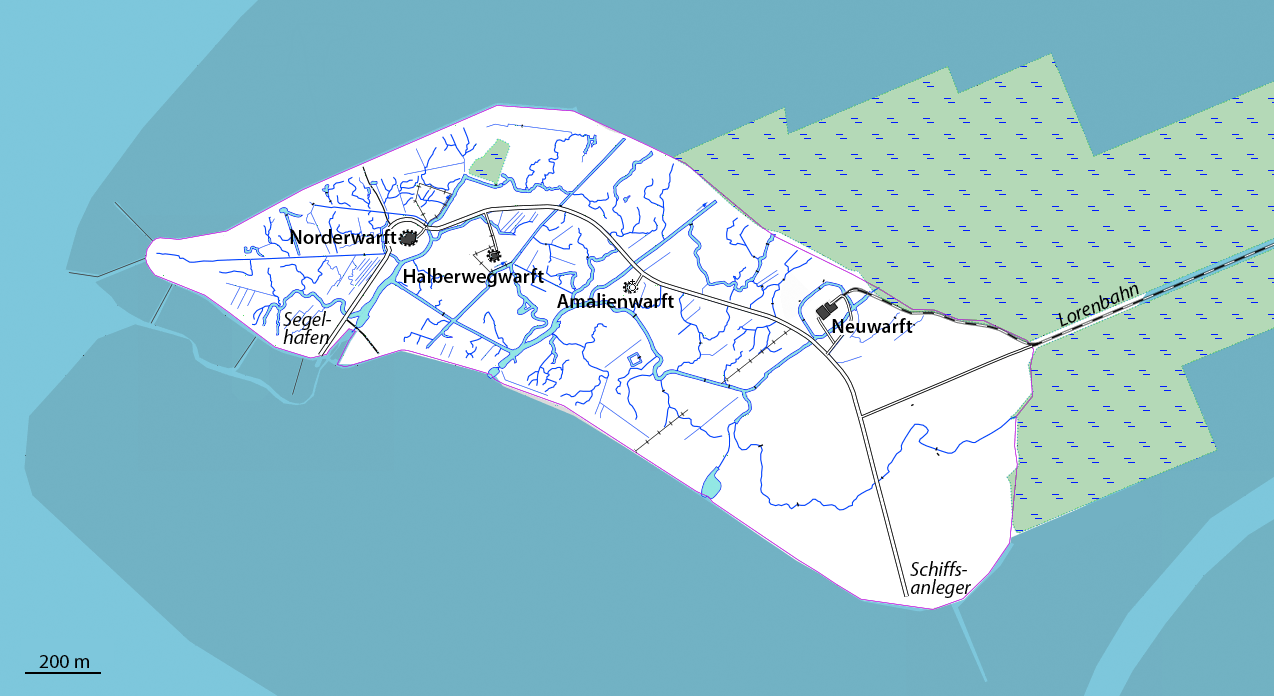 Karte von Nordstrandischmoor